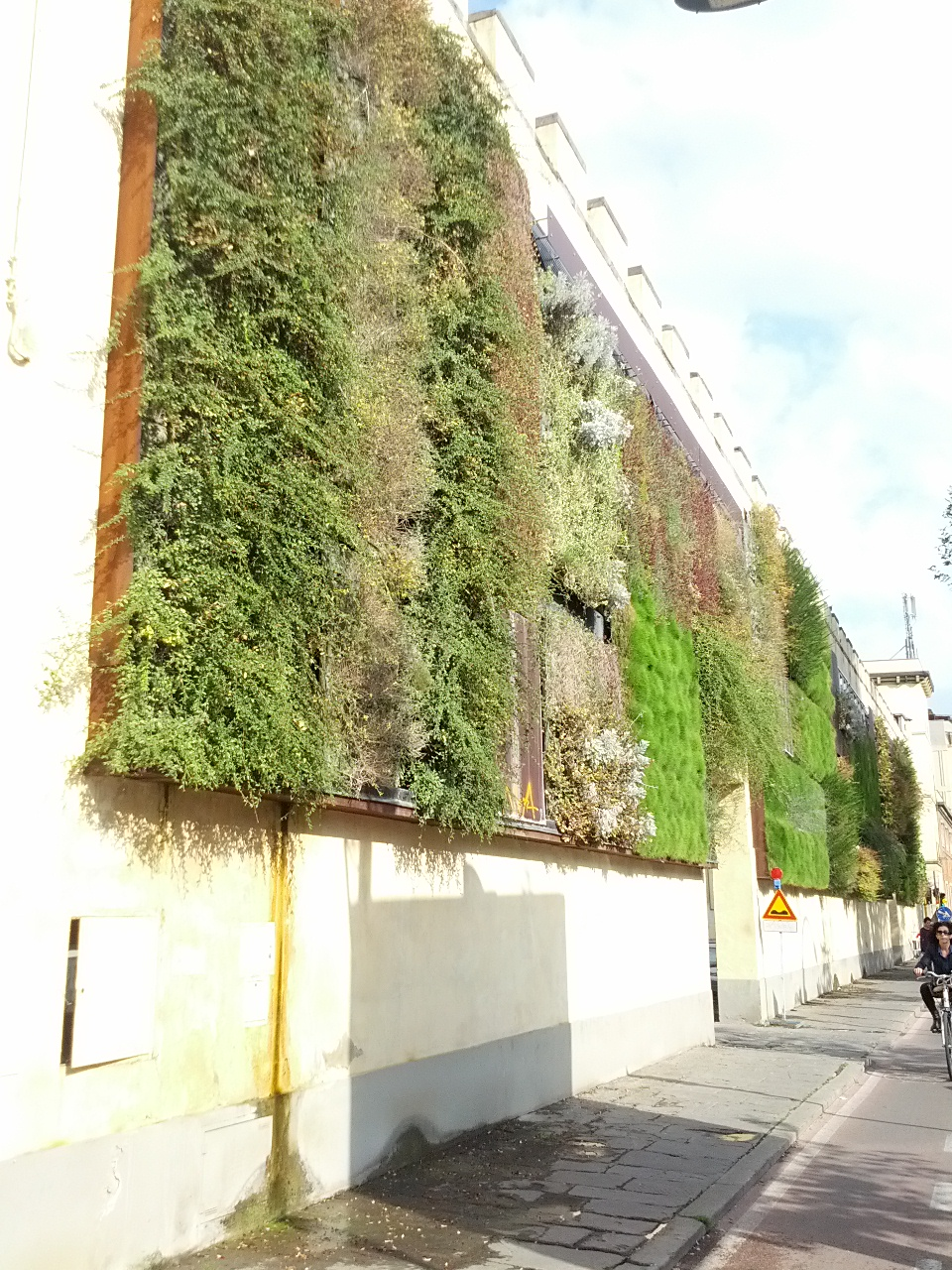 Le Murate, Firenze